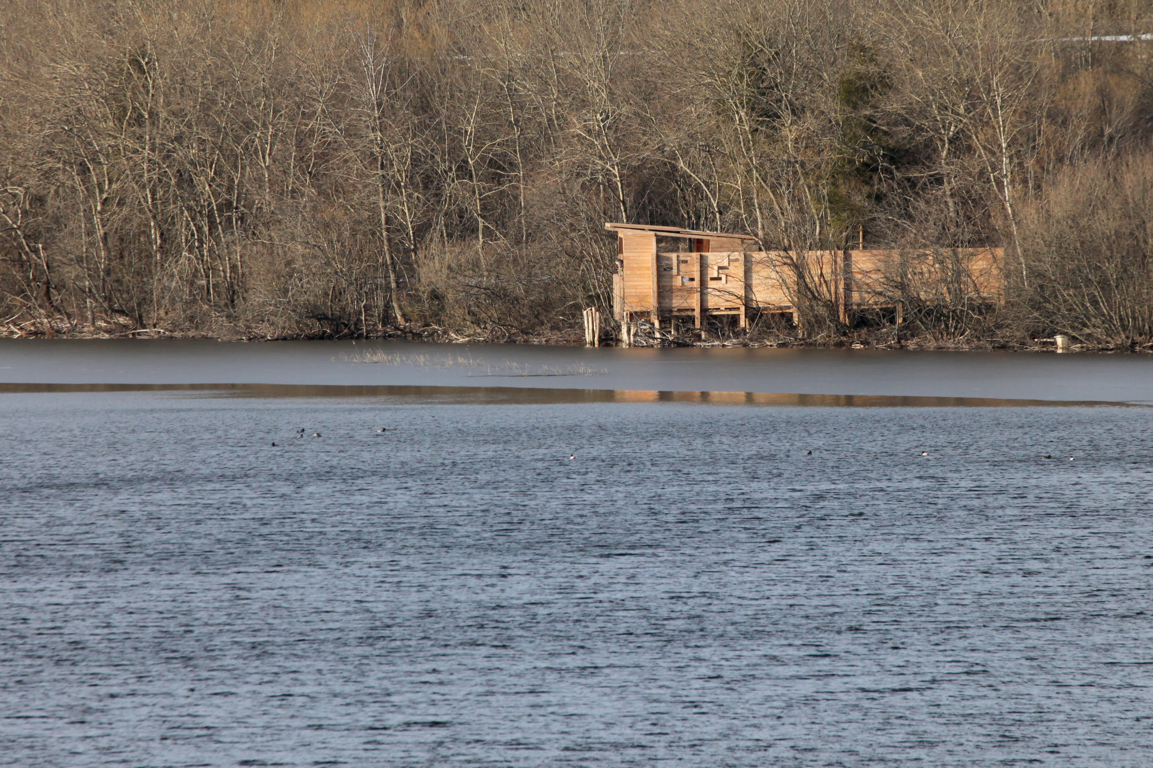 Observatoire ornithologique au lac de l'Entonnoir.